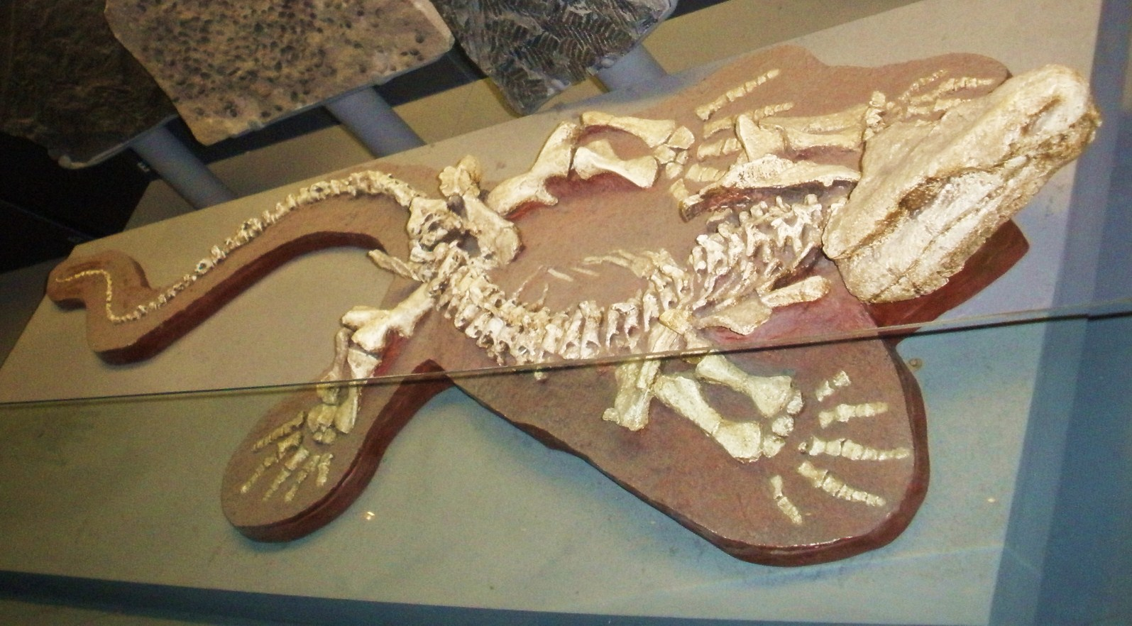 Fossil of Limnoscelis, an extinct vertebrate-- Took the photo at Natural History Museum, London